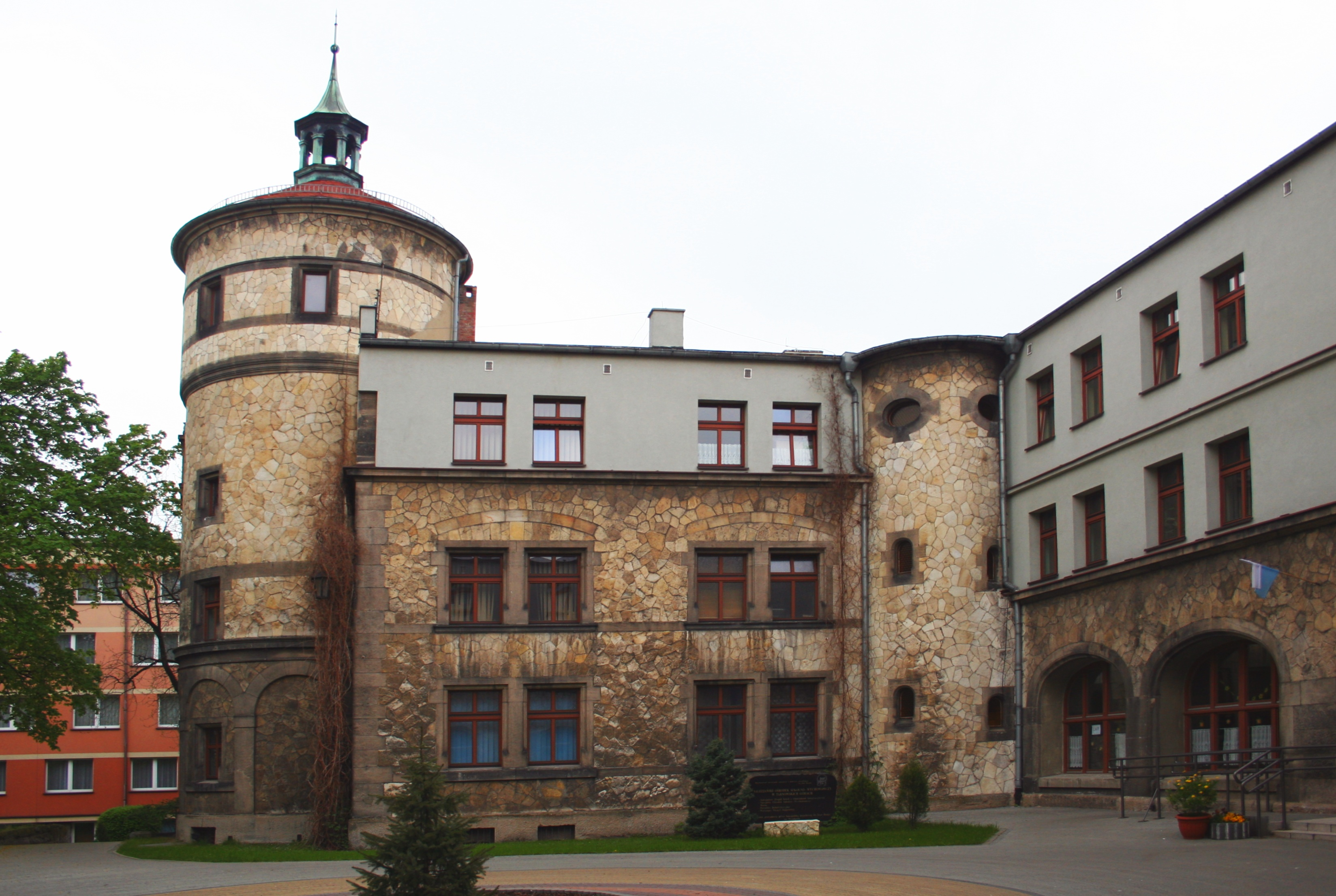 Salezjański Ośrodek Szkolno-Wychowawczy (Tarnowskie Góry) - detal, Polska, województwo śląskie